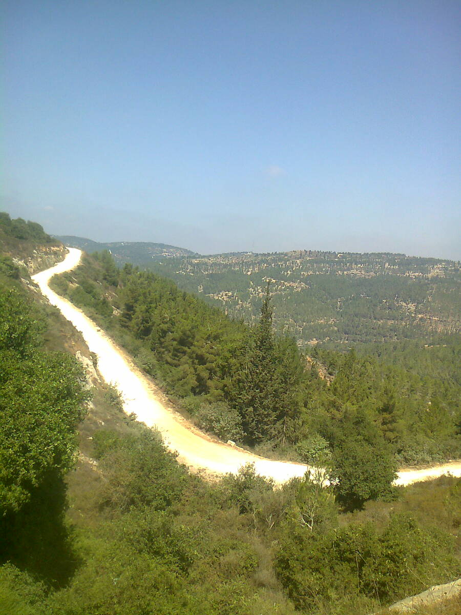 תמונה זו מתארת מסלול בהרי ירושלים